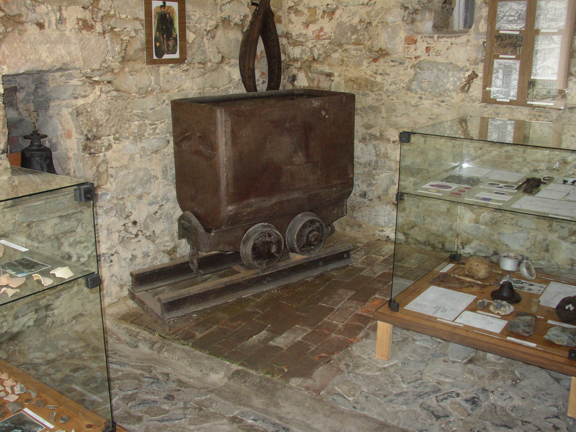 Hornický vozík v Hornickém muzeu v Jiřetíně pod Jedlovou